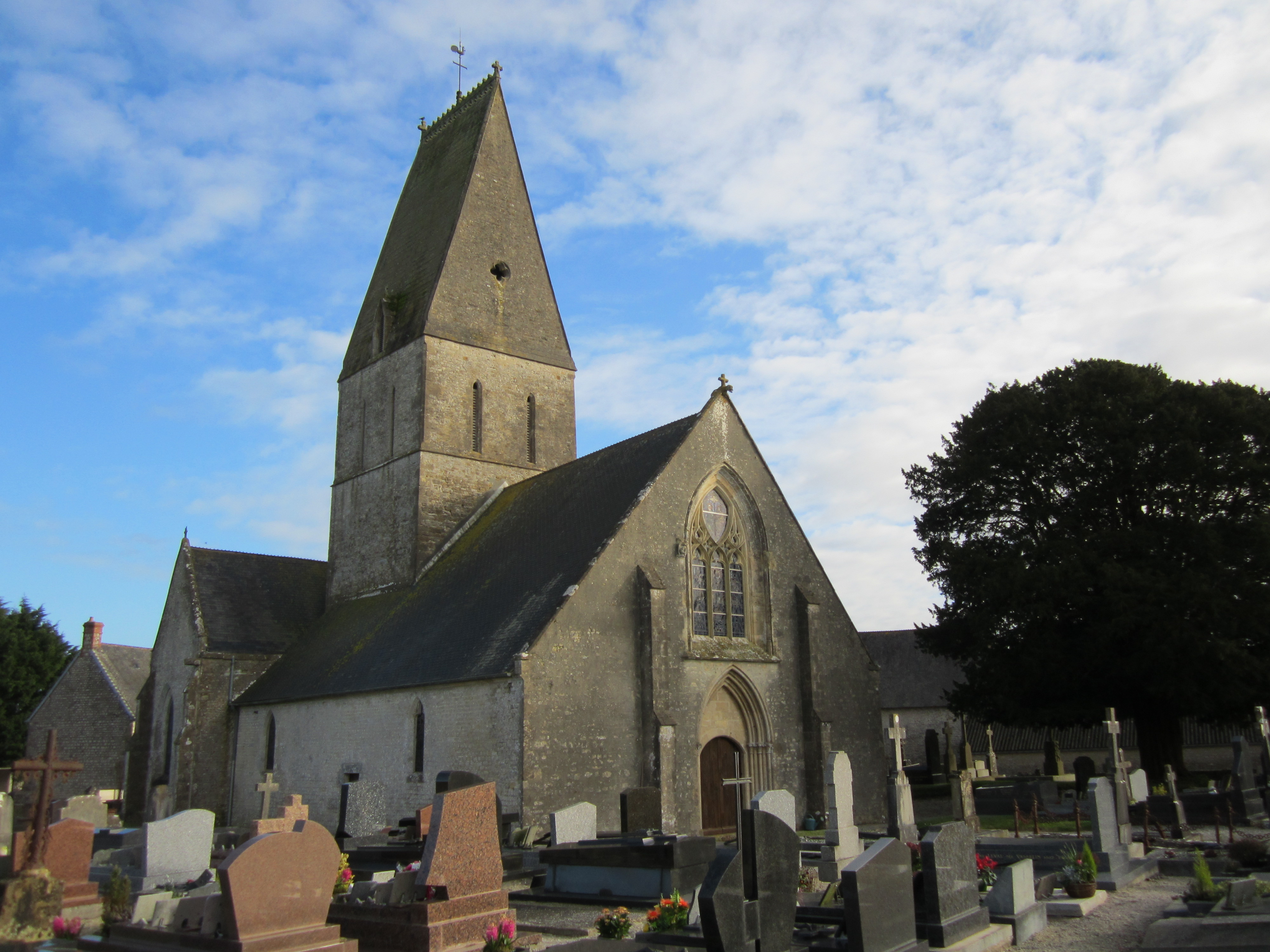 Église Notre-Dame de Turqueville .